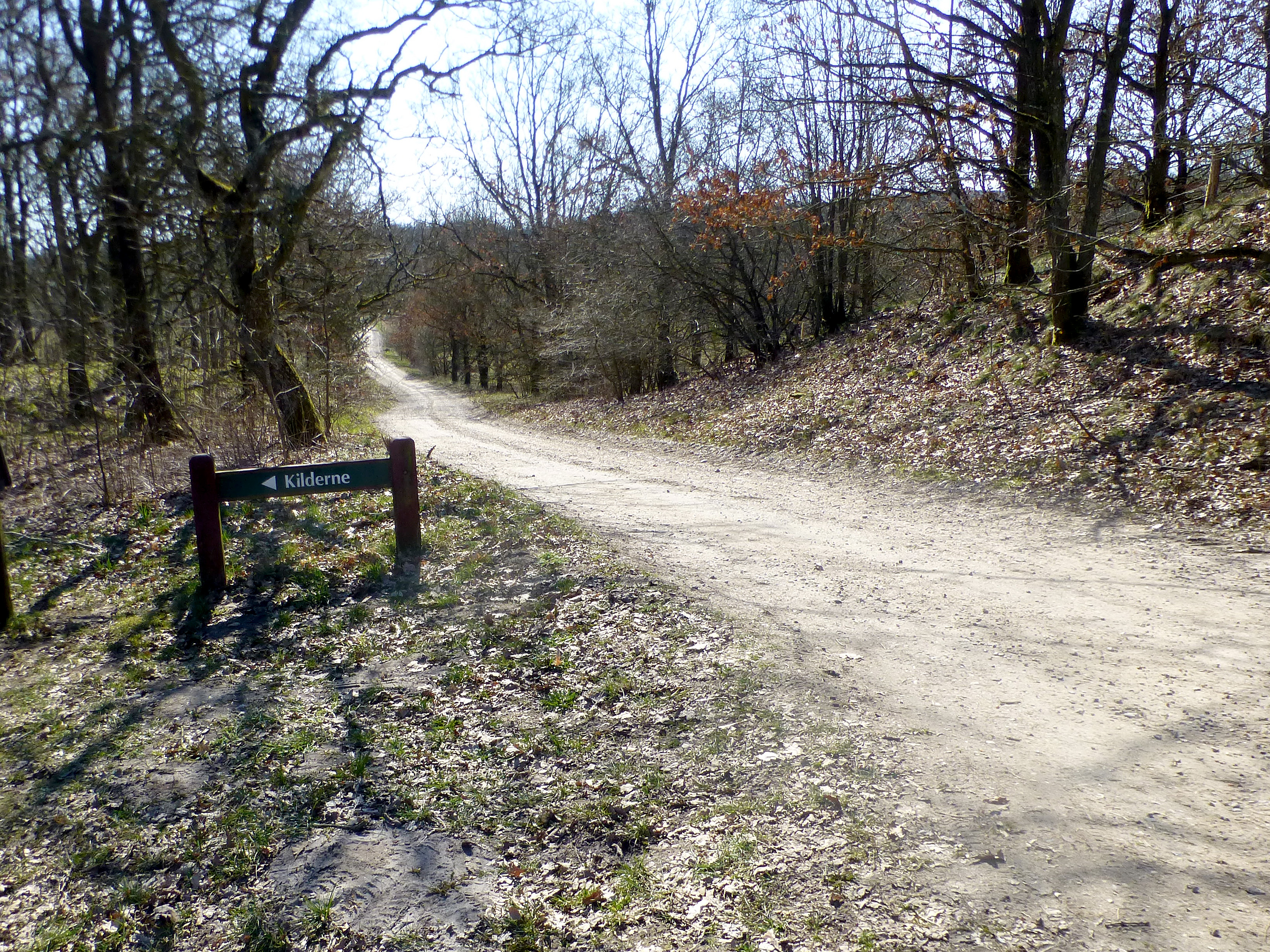 Hærvejen ved vandskellet tæt ved Skjern Å og Gudenås udspring